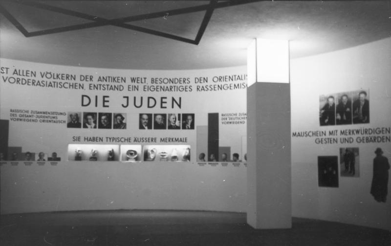 München, Ausstellung "Der ewige Jude" München.- Ausstellung "Der ewige Jude" im Deutschen Museum, 7. - 8.11.1937. Innenraum